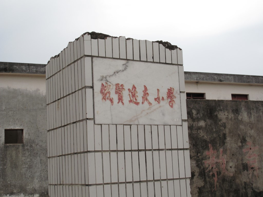 海南 東方市 俄賢逸夫小學